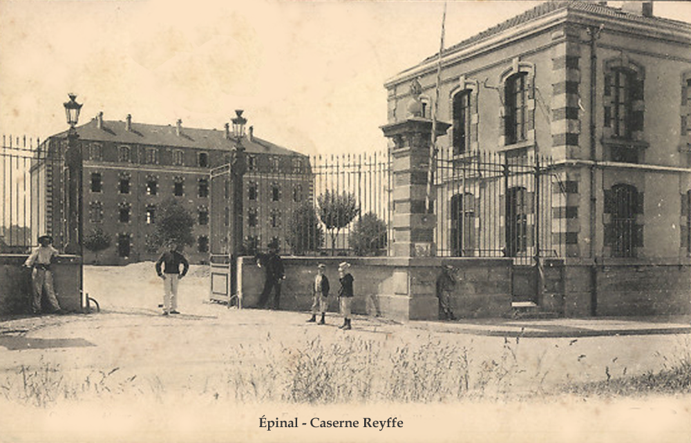 Reyffe Kaserne in Épinal um 1905